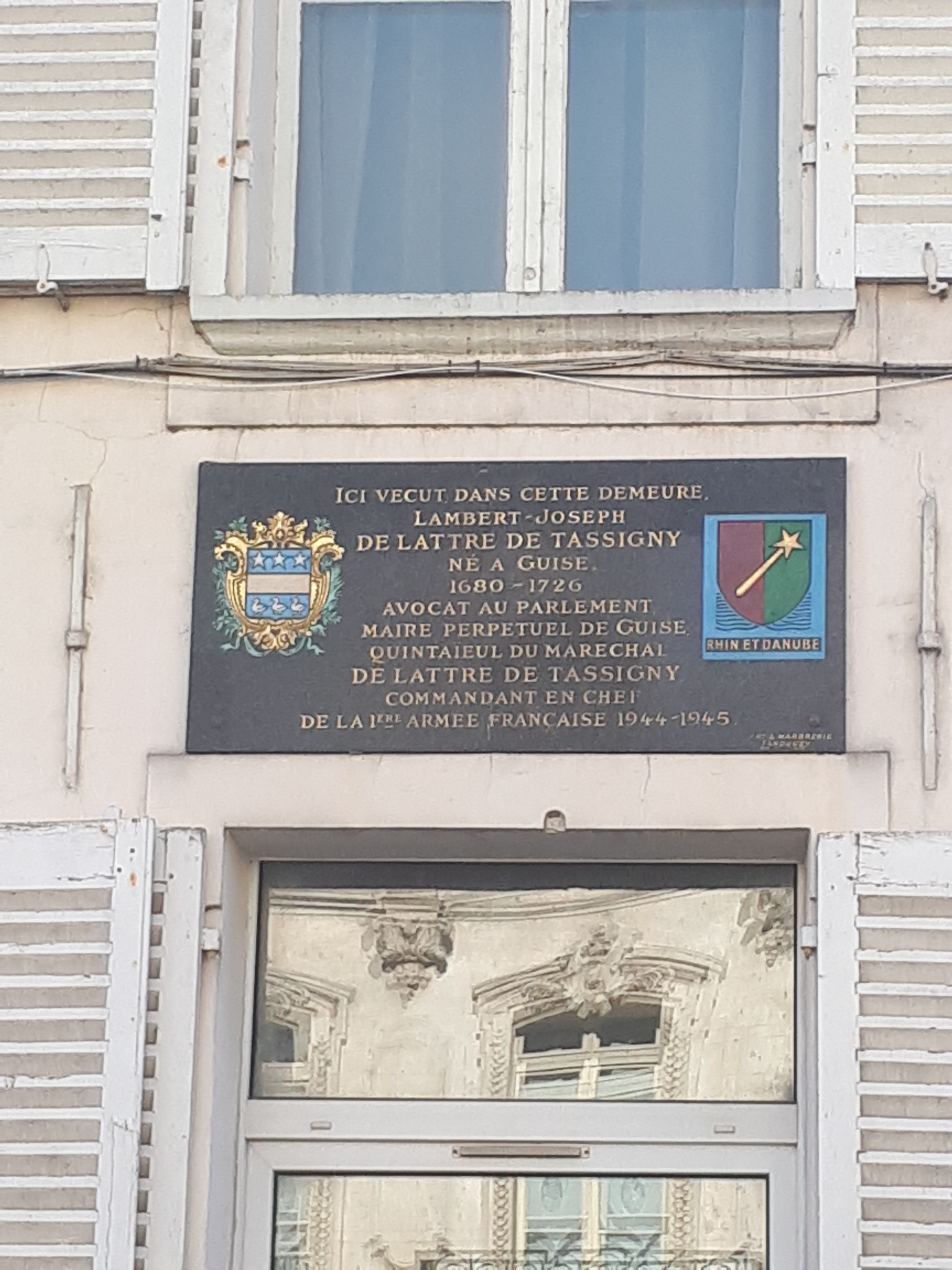 Inscription apposée sur l'Hôtel Warnet à Guise